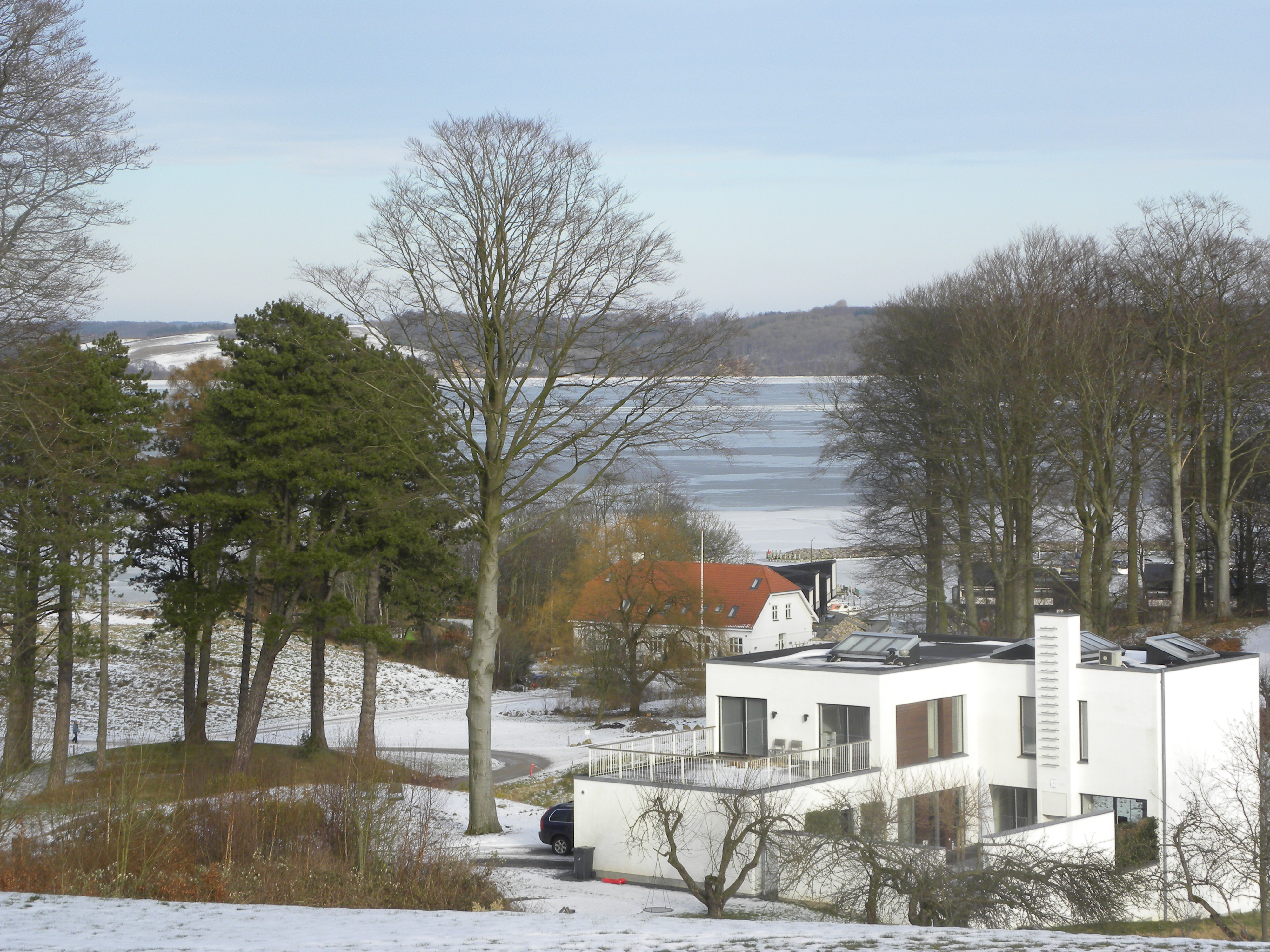 Kellers Park Brejning